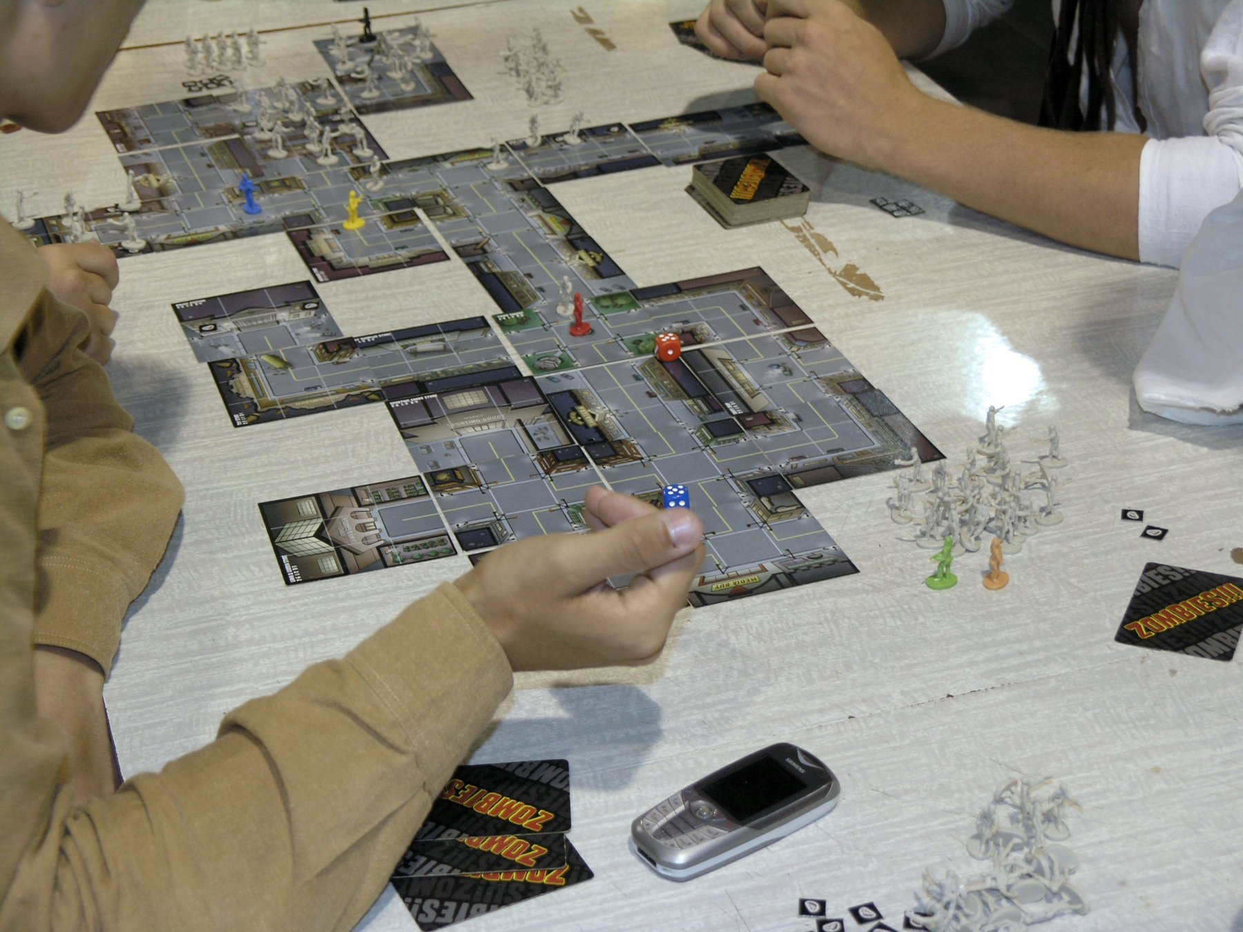 GameCon 2007 in Pardubice - Zombies!!!